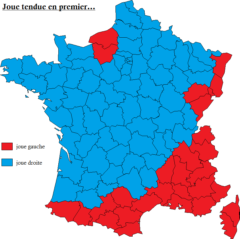 Joue tendue en premier pour faire la bise en France : données issues du site